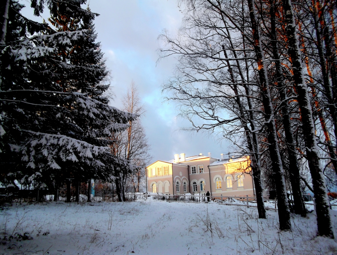 Усадьба